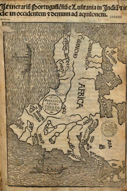 Montalboddo, Madrignano, Itinerarium Portugallensium 1508 title page